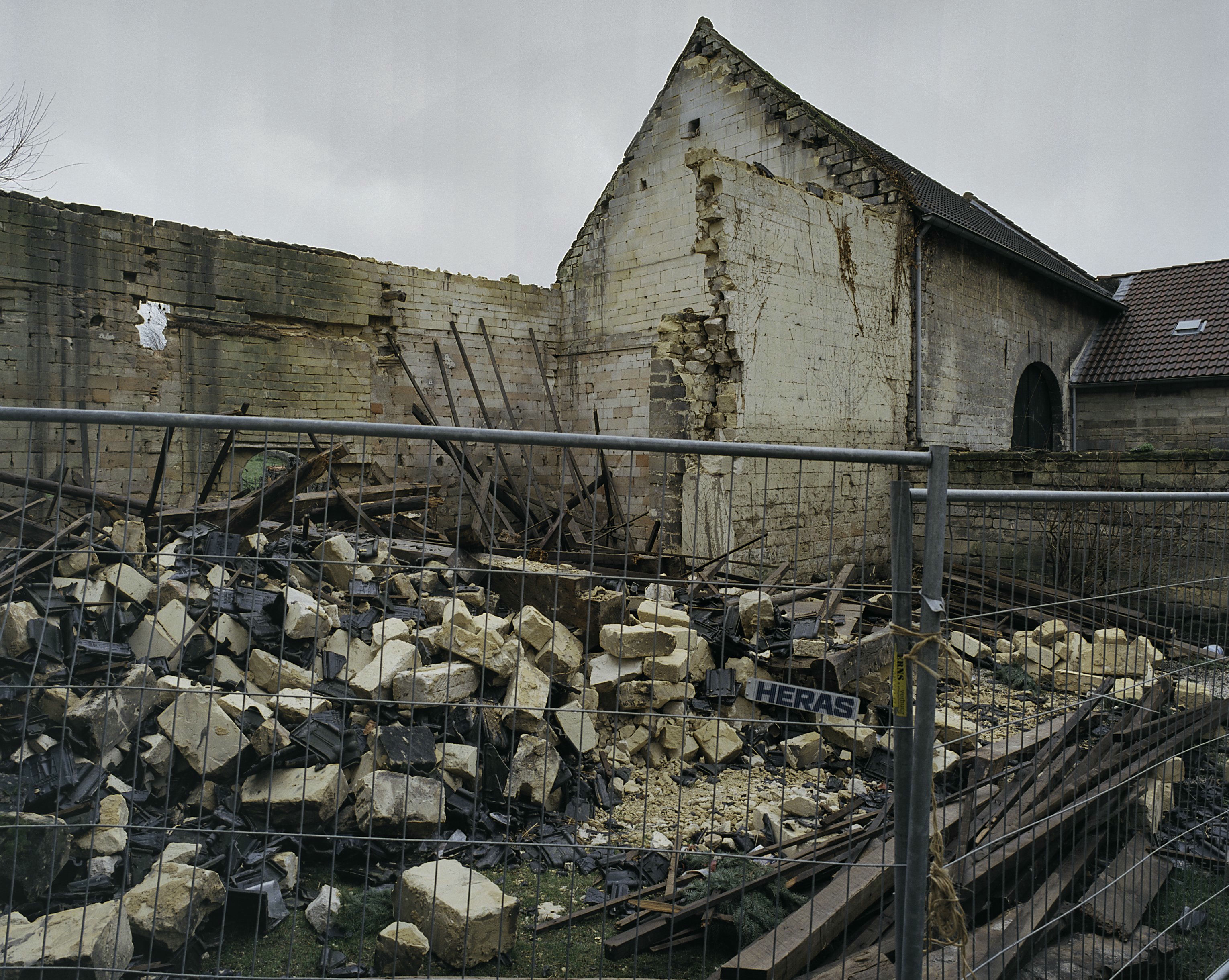 Stormschade/ Schuur: Als gevolg van storm ingestorte schuur